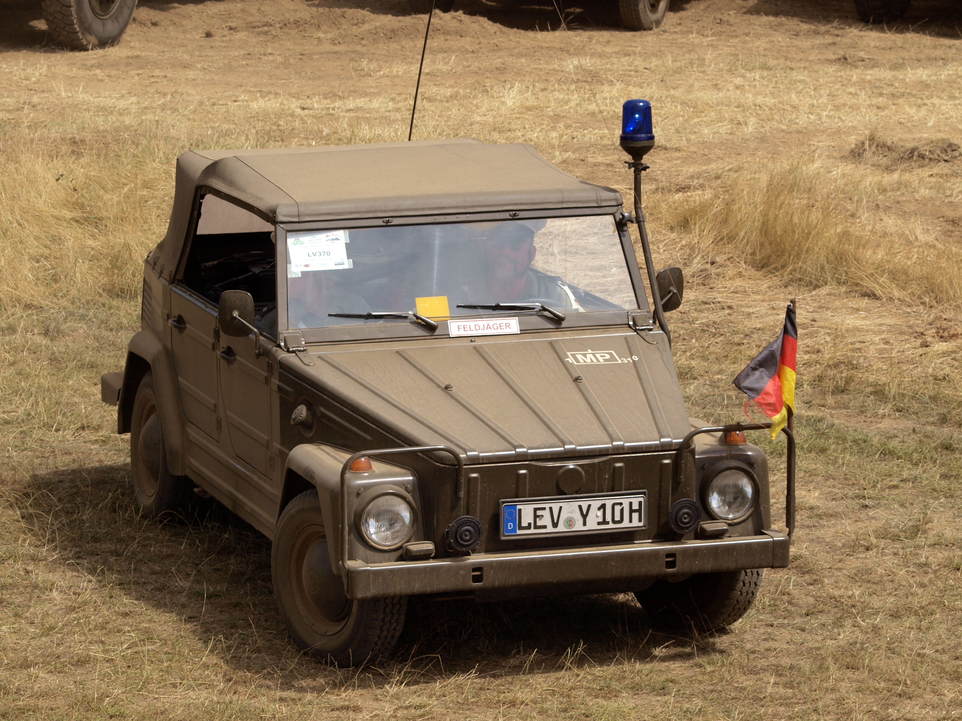 Volkswagen 181 Kubelwagen (1969) (owner Andreas Fells, Bundeswehr Feldjäger LHG)